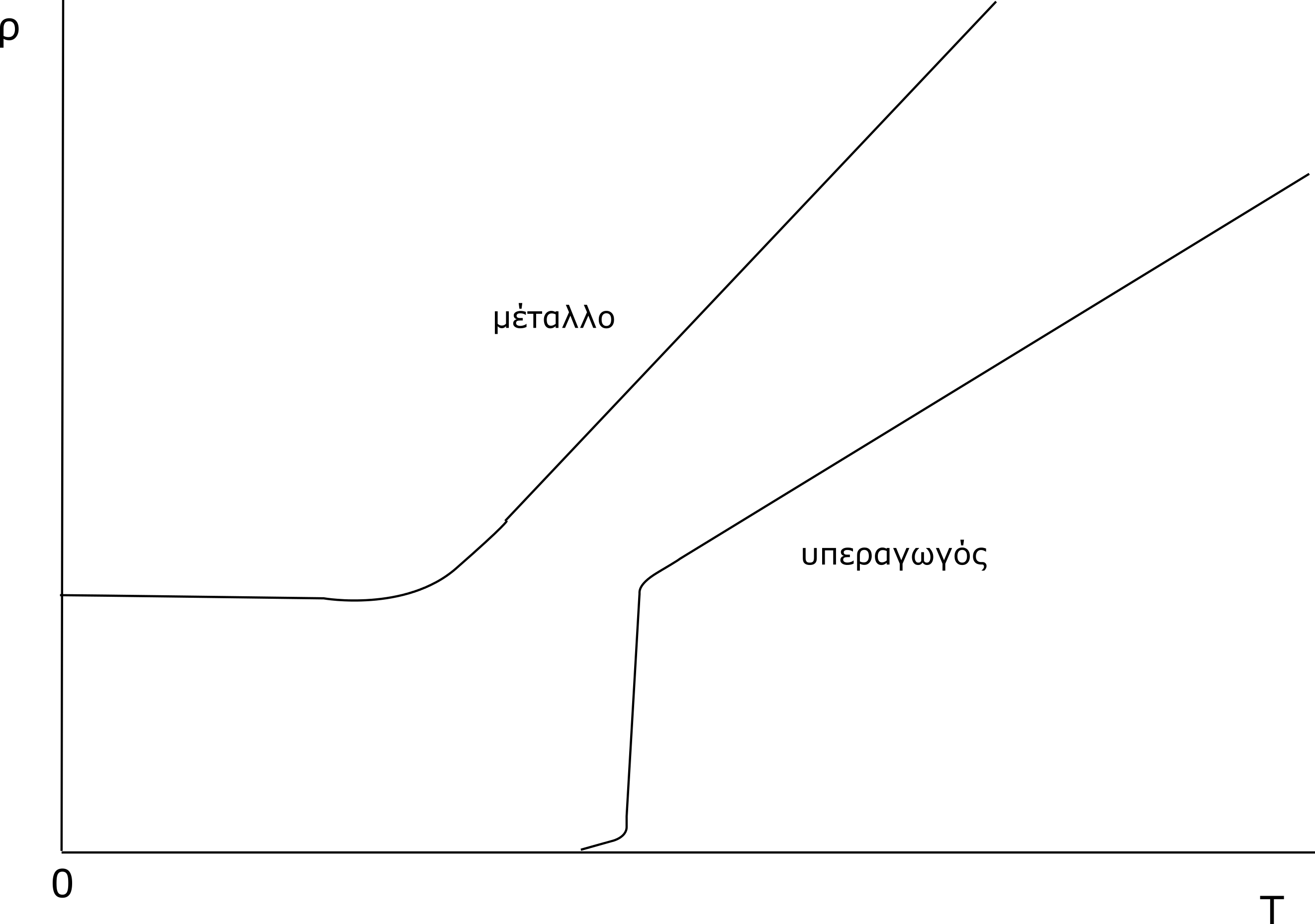 ειδική αντίσταση σαν συνάρτηση της θερμοκρασίας για μέταλλο και υπεραγωγό